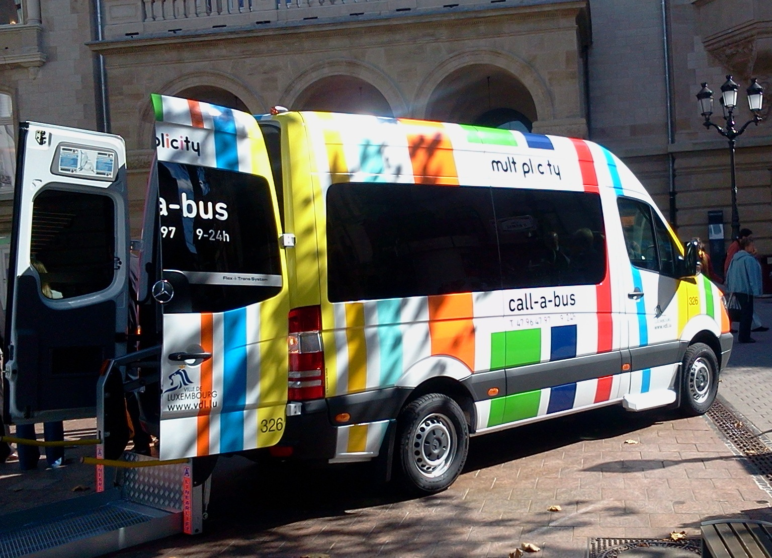 Mercedes-Benz Sprinter als Call-a-Bus (#326). Presentatioun vun den neie Faarwen vun den AVL (Autobus de la Ville de Luxembourg); op der Plëss (place d'Armes) den 12.09.2011